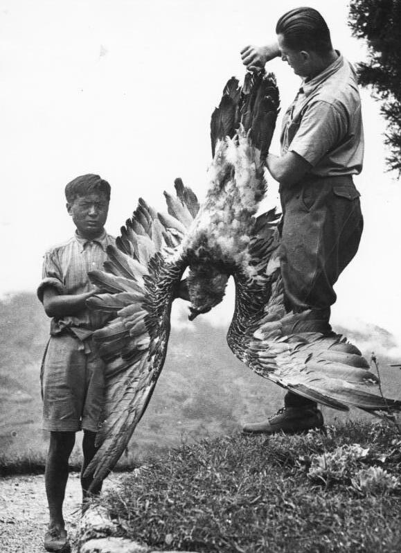 Tibetexpedition, Erlegter Bartgeier Gangtok, Geer und Mingma mit erlegtem Lämmergeier [Lämmergeier, Bartgeier]